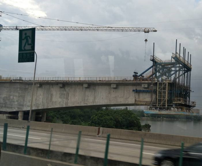 广州东北货运绕行线在建的流溪河大桥